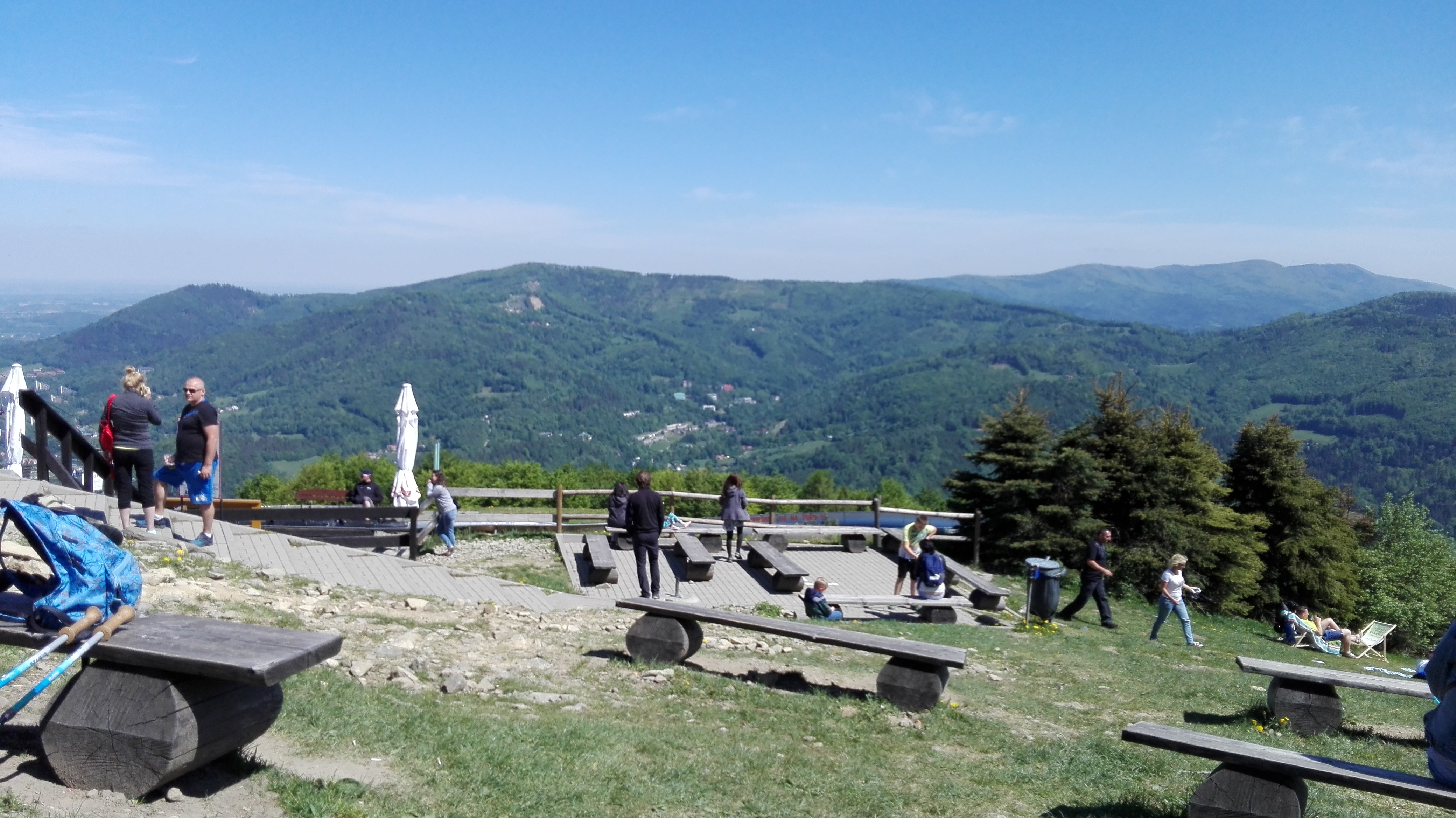 Czantoria, widok z pod górnej stacji wyciągu krzesełkowego